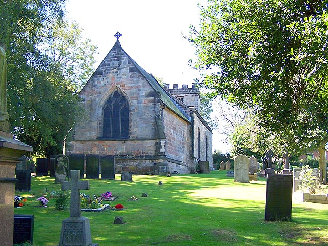 Kirk Hallam Church near Ilkeston